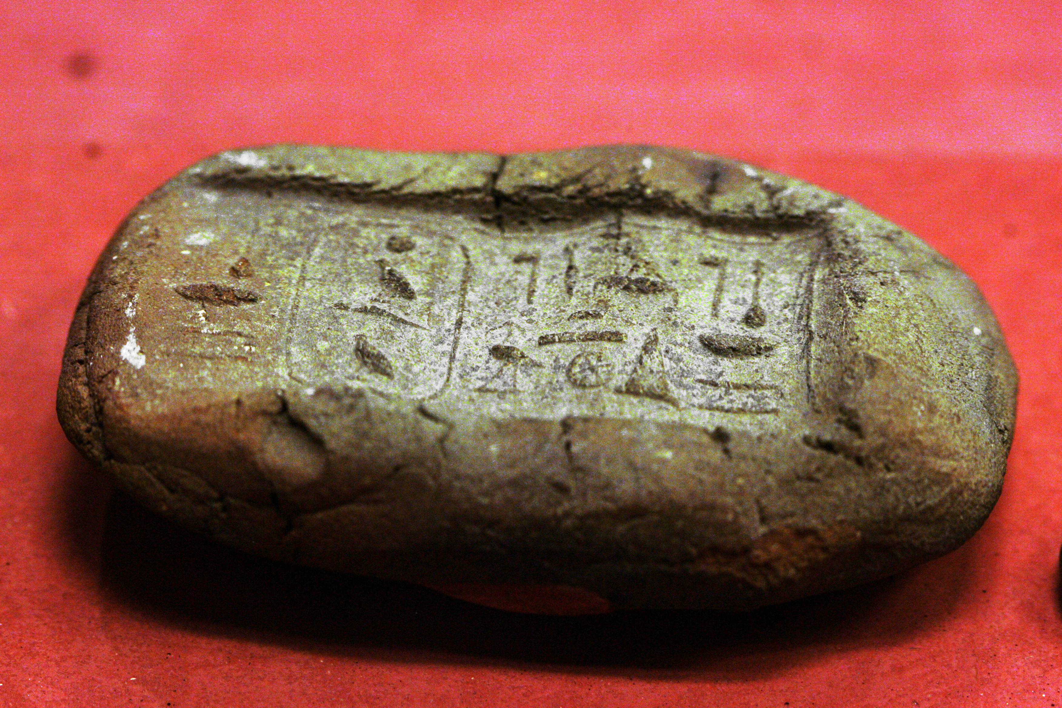 ArtistUnknownDescription Scellé en argile de la pyramide de Khéops. DimensionsL.: 9,7 cm. ; l.: 5,8 cm. ; ep.: 2,6 cm.Current location (Inventory)Louvre Museum Native nameMusée du LouvreLocationParisCoordinates48° 51′ 37″ N, 2° 20′ 15″ E Established1793Website control : Q19675 VIAF: 257711507 ISNI: 0000 0001 2260 177X ULAN: 500125189 LCCN: n80020283 NLA: 35912436 WorldCat Pyramide de KhéopsAccession numberE 22350ReferencesLouvre.frSource/PhotographerRama Scellé en argile de la pyramide de Khéops.